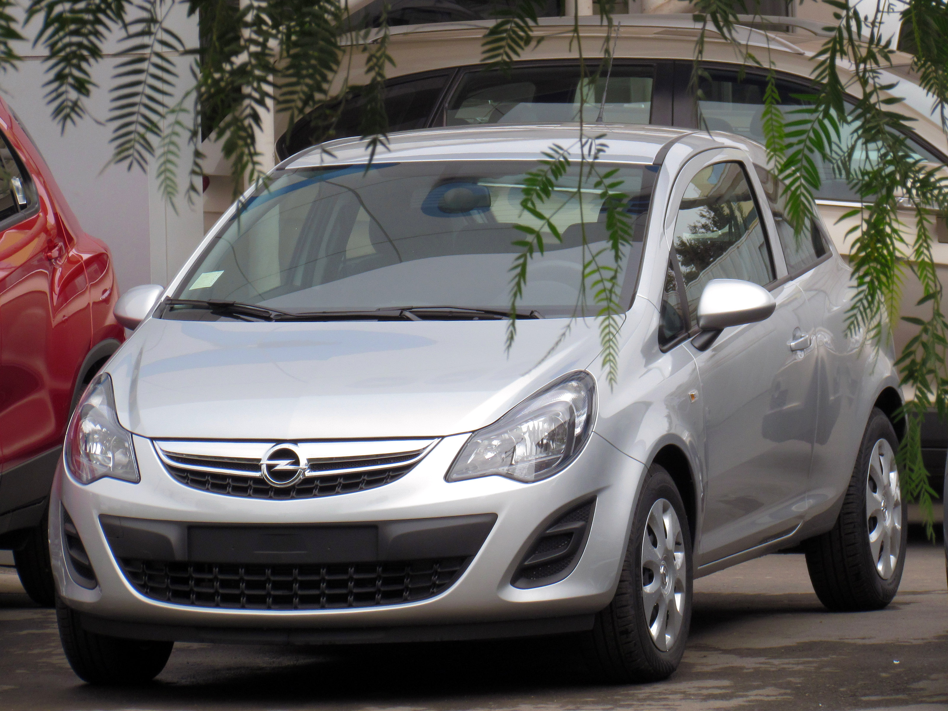 Base model